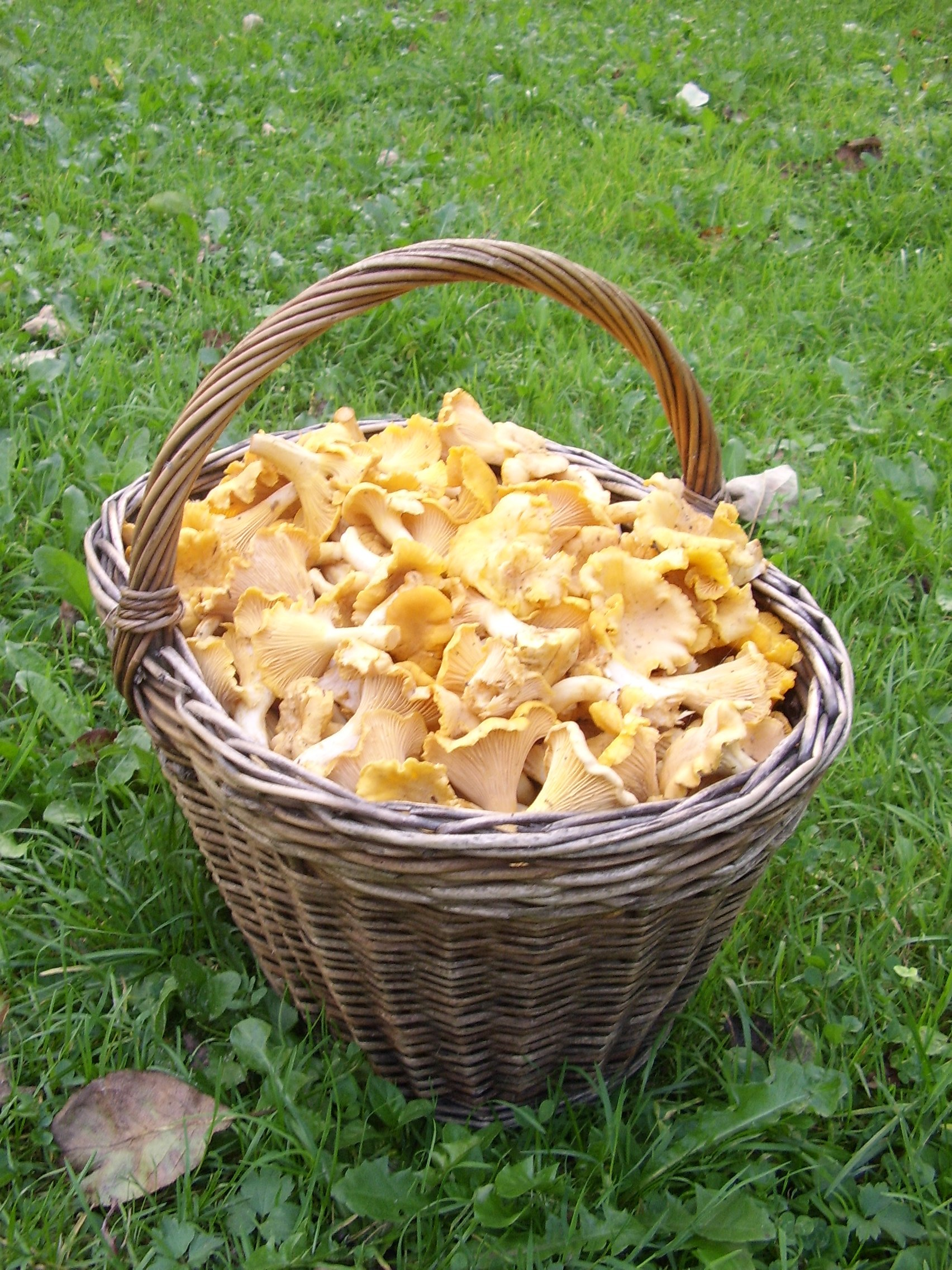 Voveraitės...